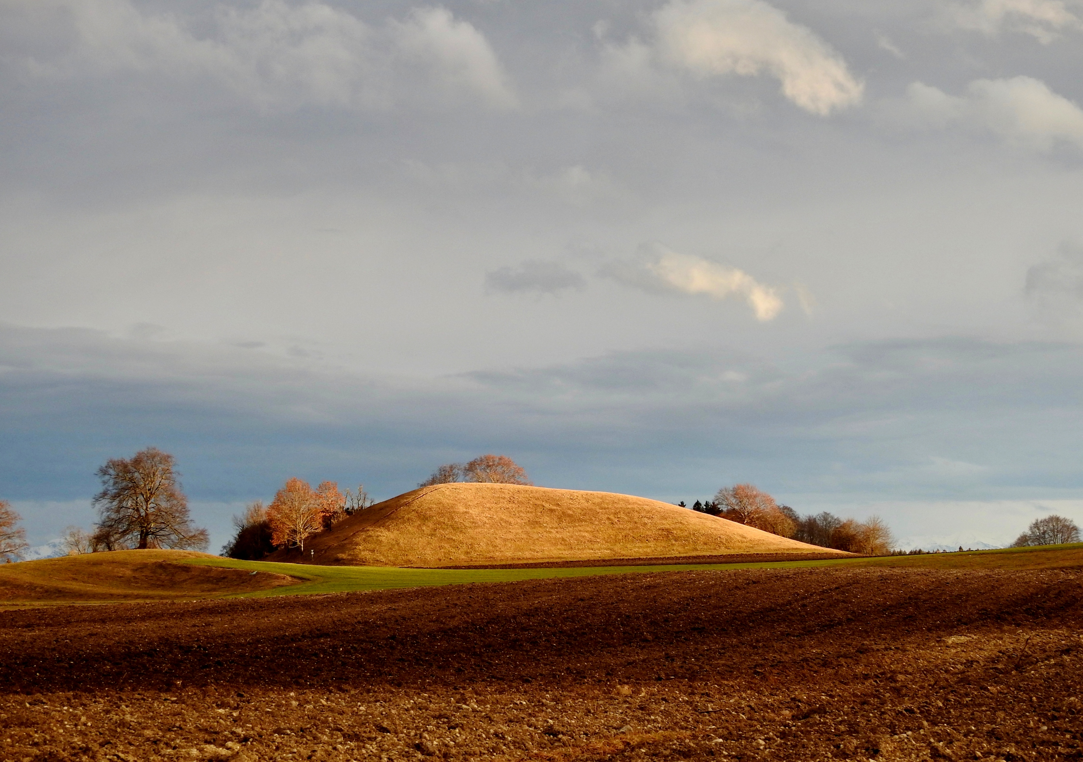 Andechs, Naturdenkmal Bäckerbichl, ein Drumlin auf Erlinger Flur.